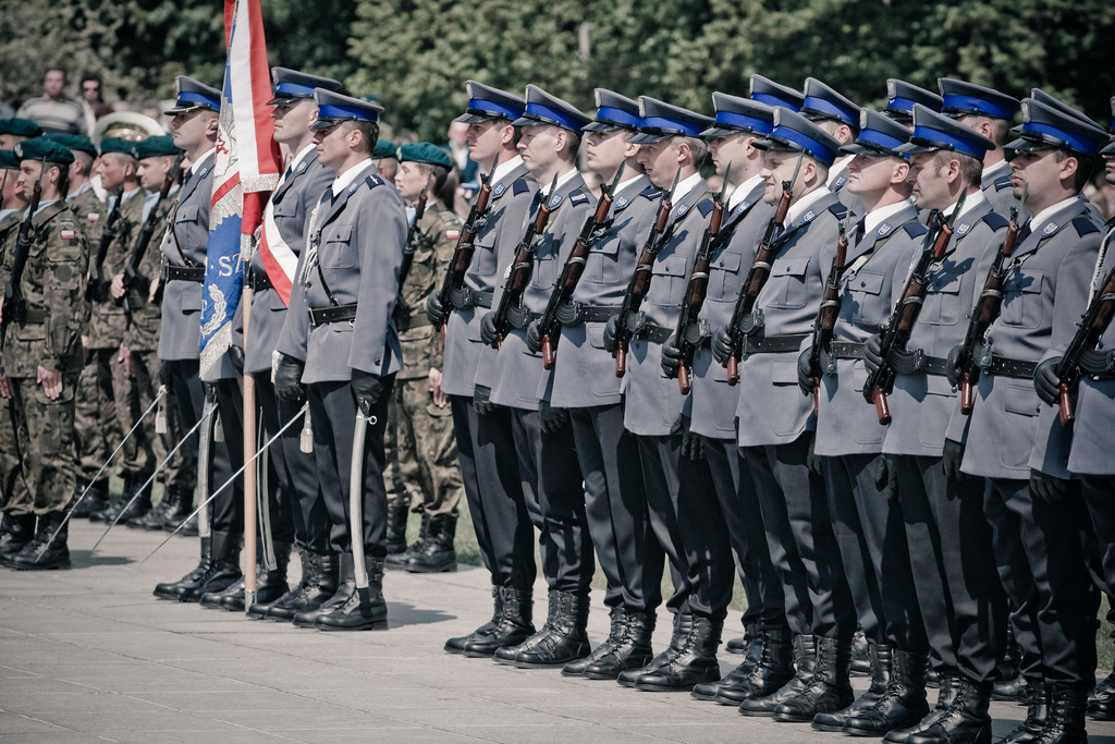 Sztandar Policji.